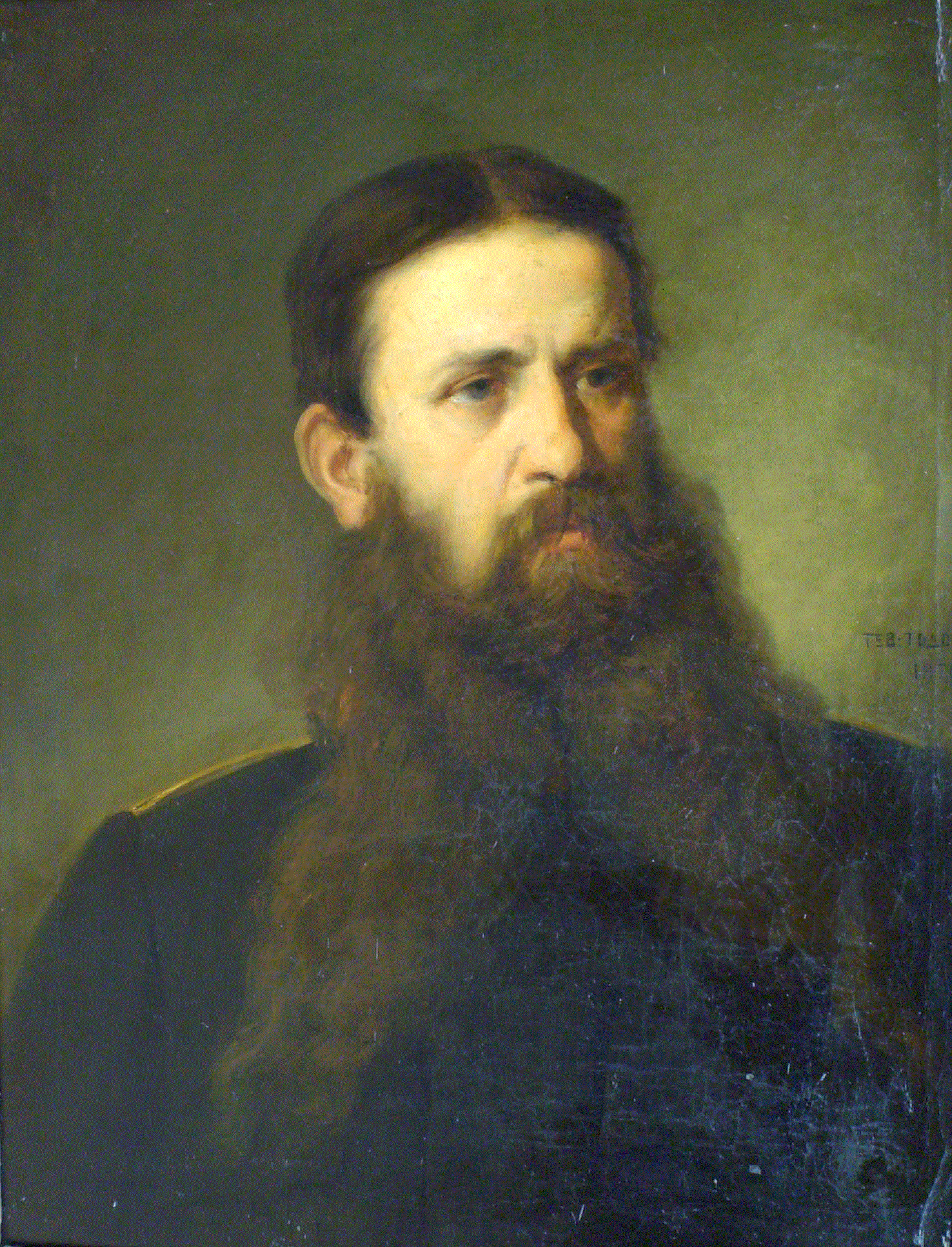 Генерал Ђура Хорватовић 65,5 x 51,5 cm, sign. и датирано доле десно, ћирилицом: С. Тодоровић 1876.